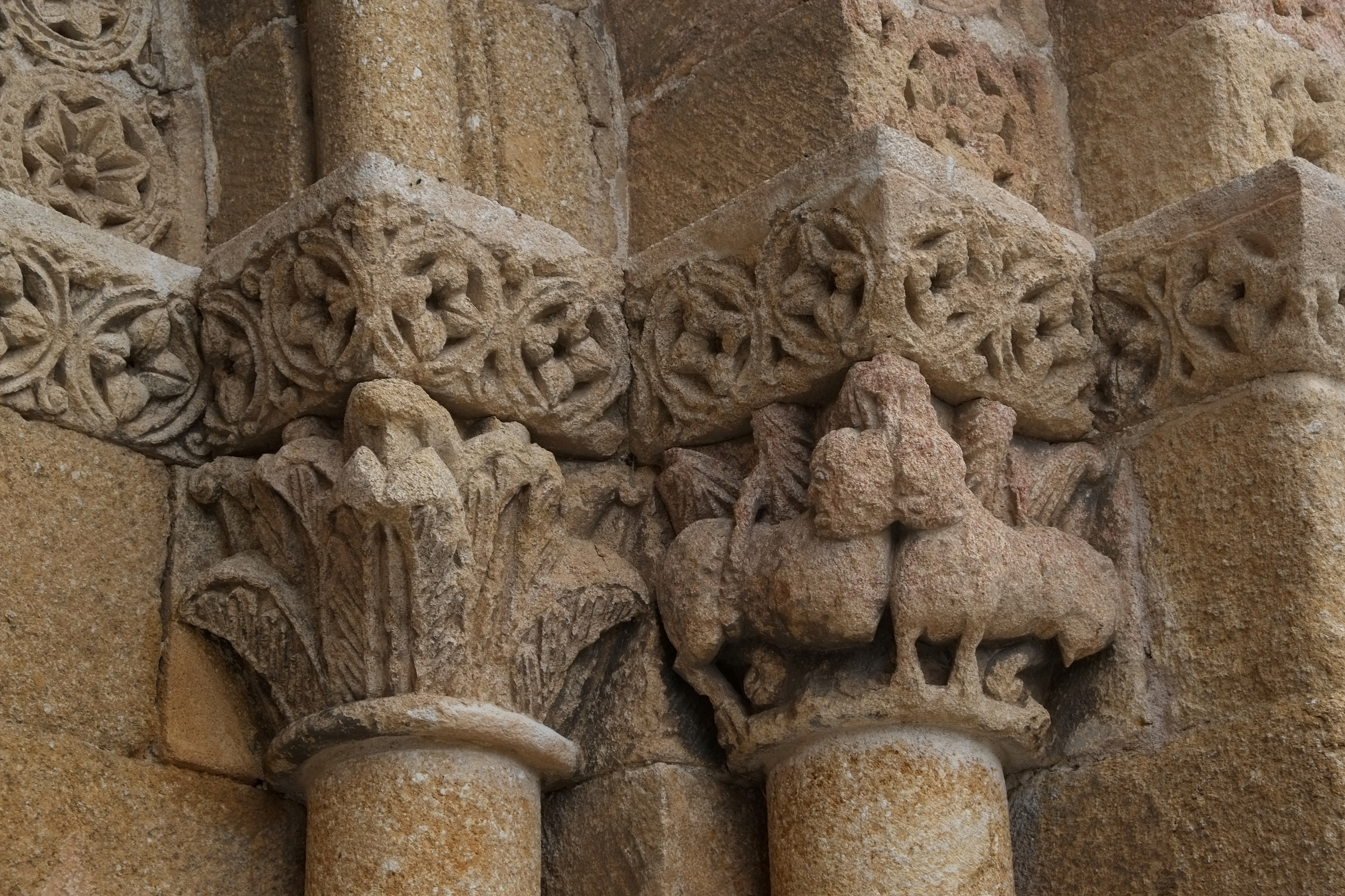 Kirche San Andrés in Ávila (Kastilien-León/Spanien), Kapitelle am Portal